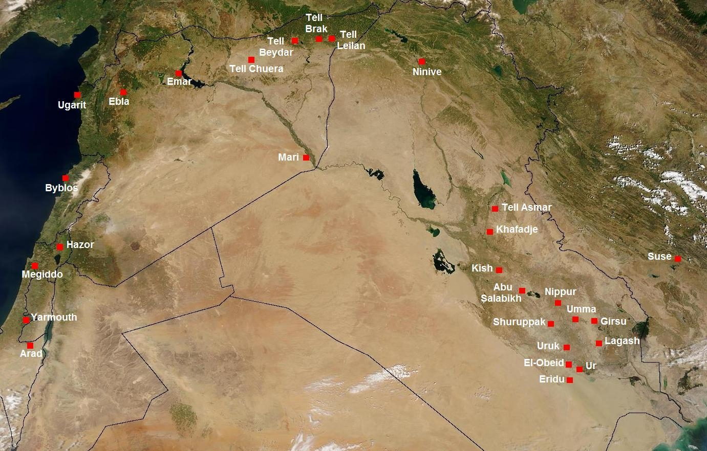 Carte du Proche-Orient à la période finale des Dynasties archaïques.